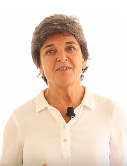 En este vídeo, nuestra diputada, Amparo Botejara nos habla del rechazo de PP y Ciudadanos a nuestra iniciativa para destinar una financiación concreta a la Atención Primaria de Salud, que es la más eficaz, la del día a día.